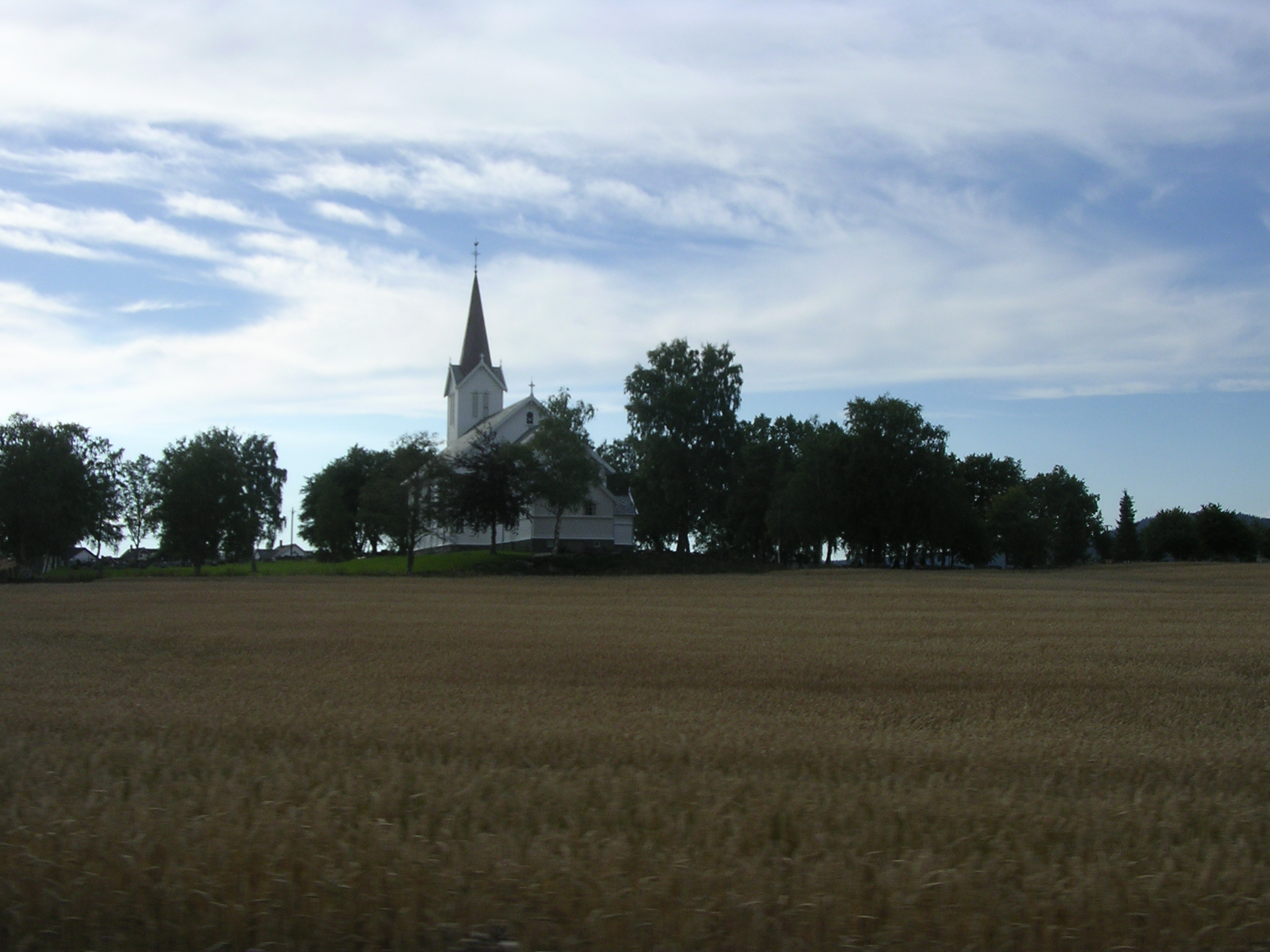 Åsen kirke i Levanger kommune, Nord-Trøndelag